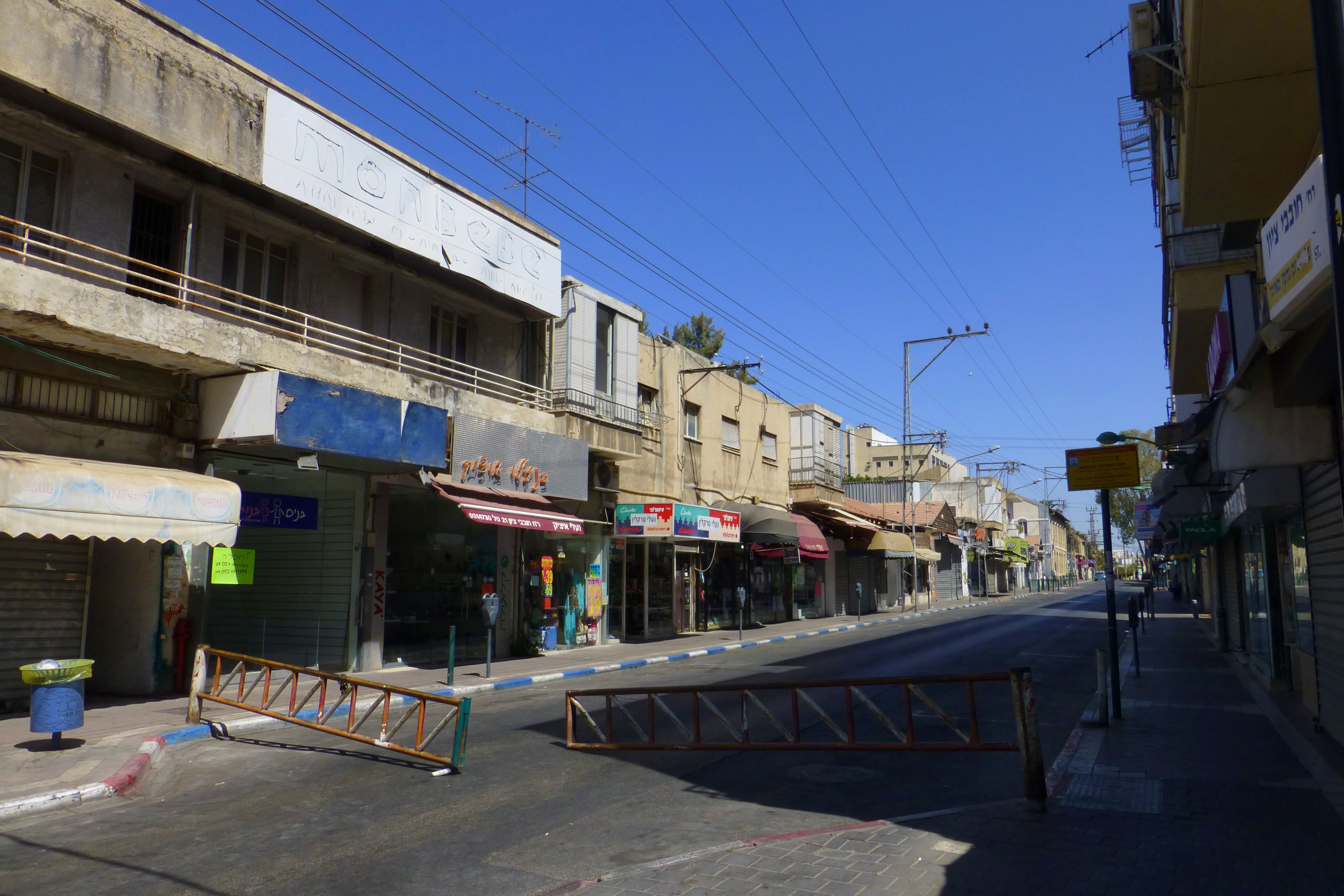 ביתו של צבי גרף, שהקים בשנת 1901 את שירות הדיליז'נסים בפתח תקווה.